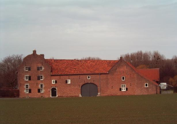 Limburgs: Ieëtselderhaof Ieëtselder, Etzenrade